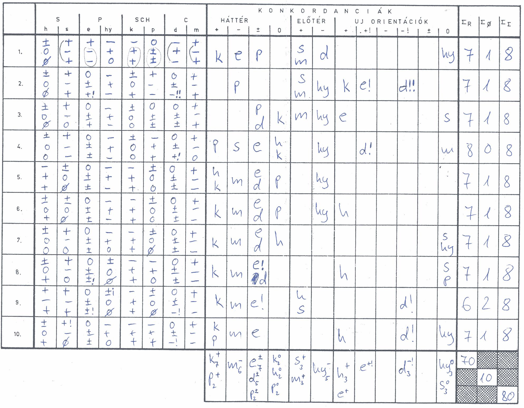 Szondi-teszt, saját tesztfelvétel, a vsz. engedélyével